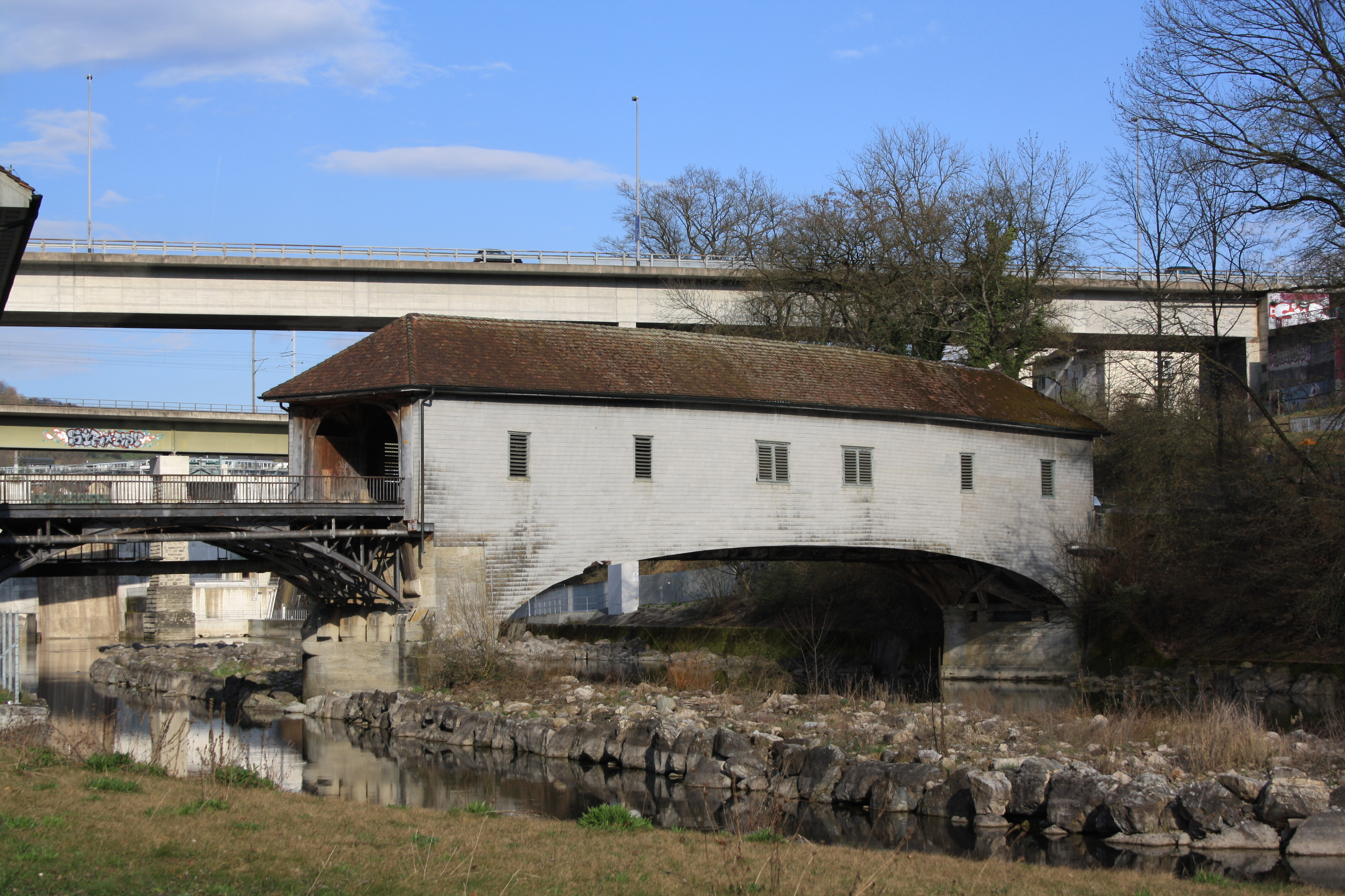 Holzbrücke zwischen Wettingen und Neuenhof, im Hintergrund die Strassen- und die Eisenbahnbrücke